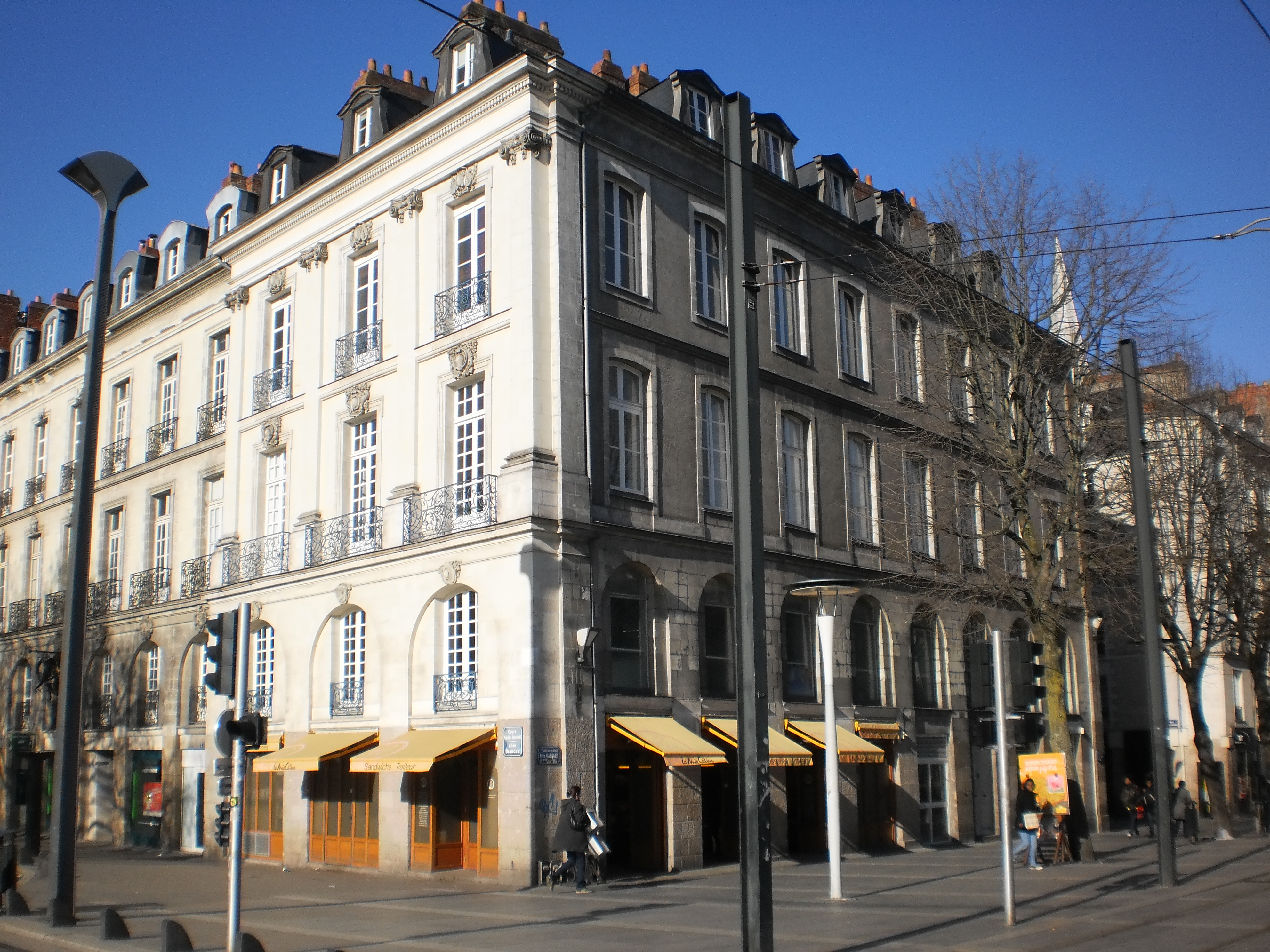 Immeuble du XVIIIème siècle de l'allée Cassard et de l'allée Brancas